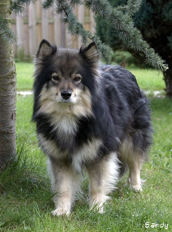 Finse Lappenhond Louhi